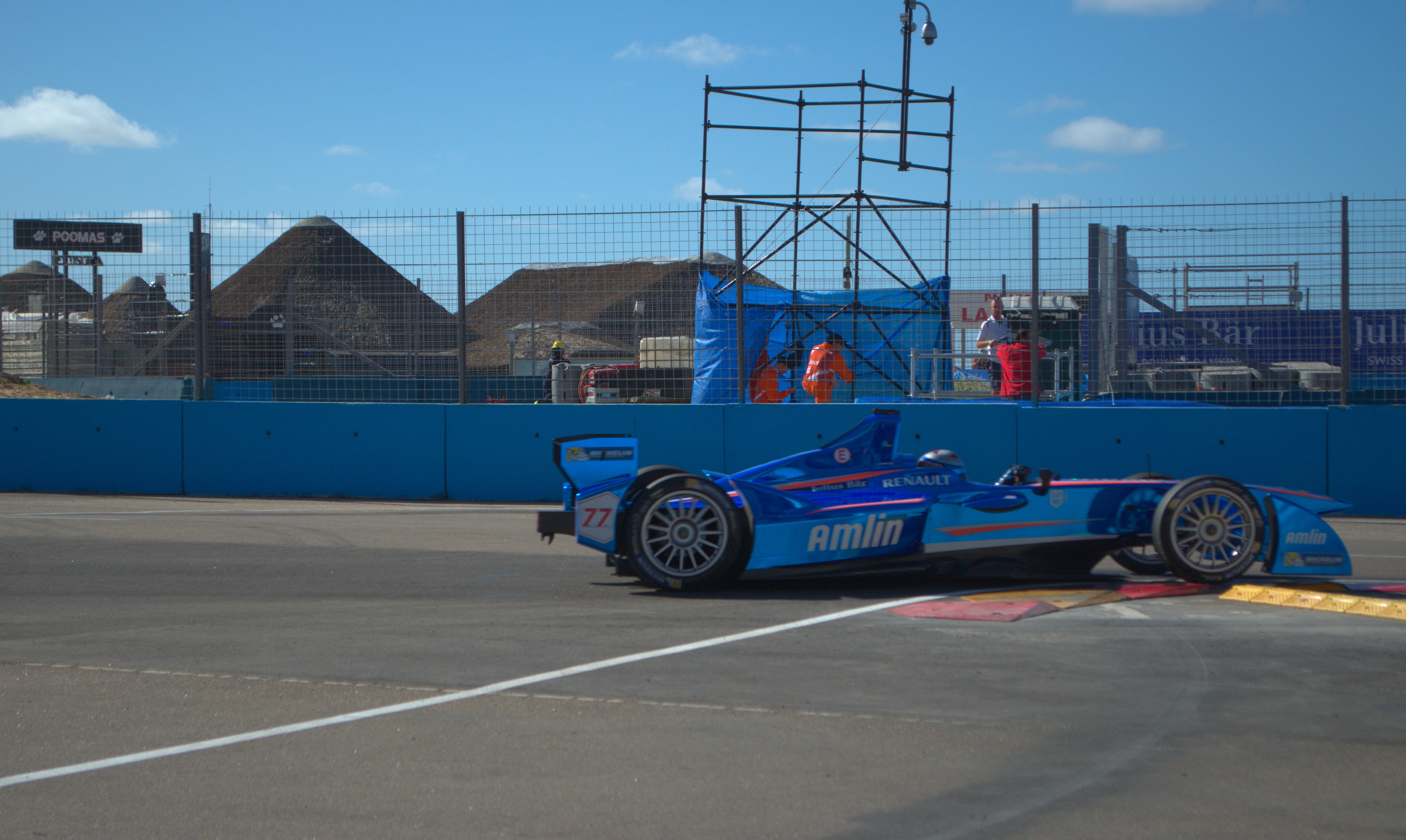 Solo se permite el uso de esta imagen mencionando a Velocidad Total como su autor. Imagen del equipo Amlin Aguri de Fórmula E, durante el Punta del Este ePrix de 2014.